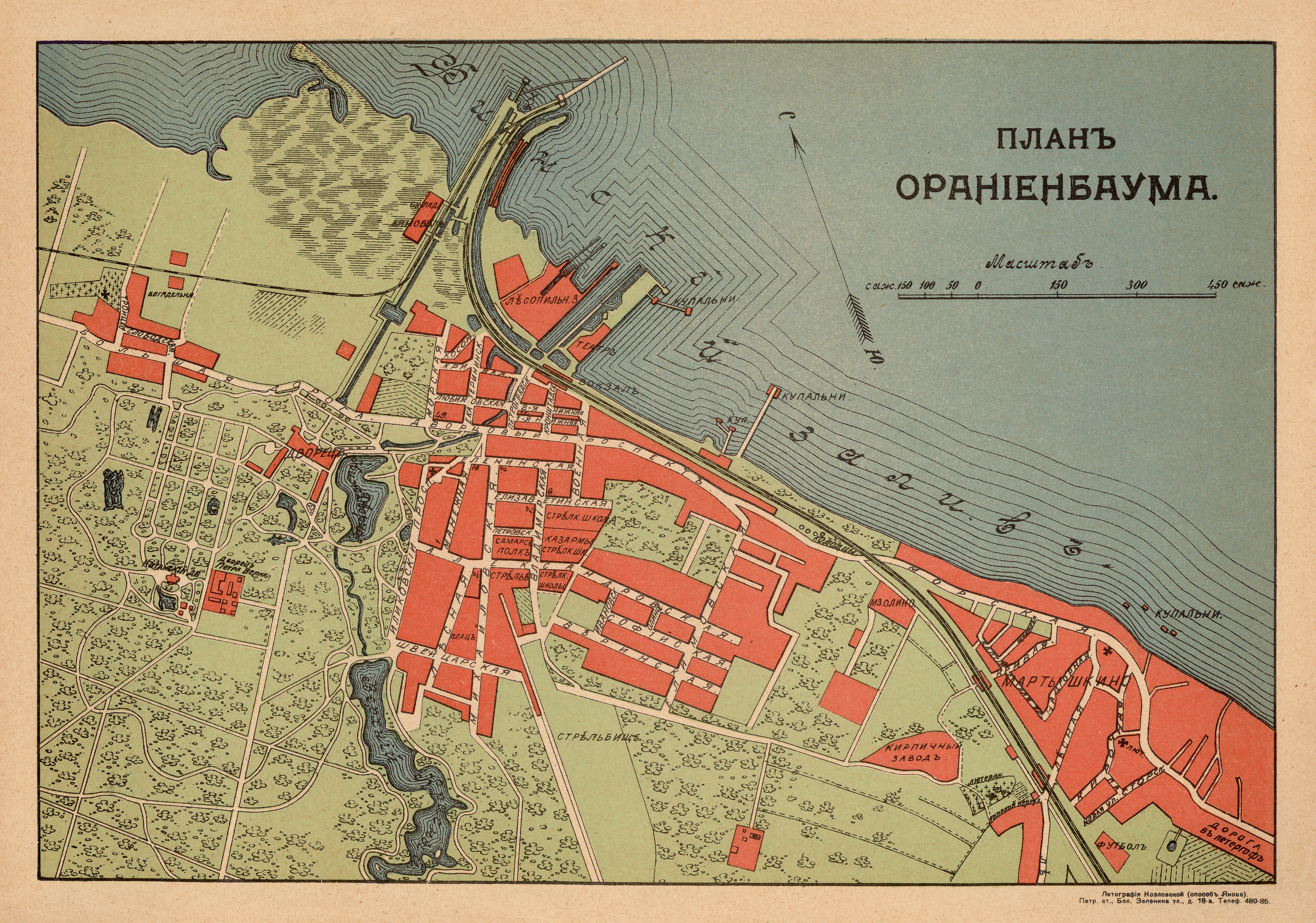 План Ораниенбаума, литография М.В. Козловской, 1915 год.